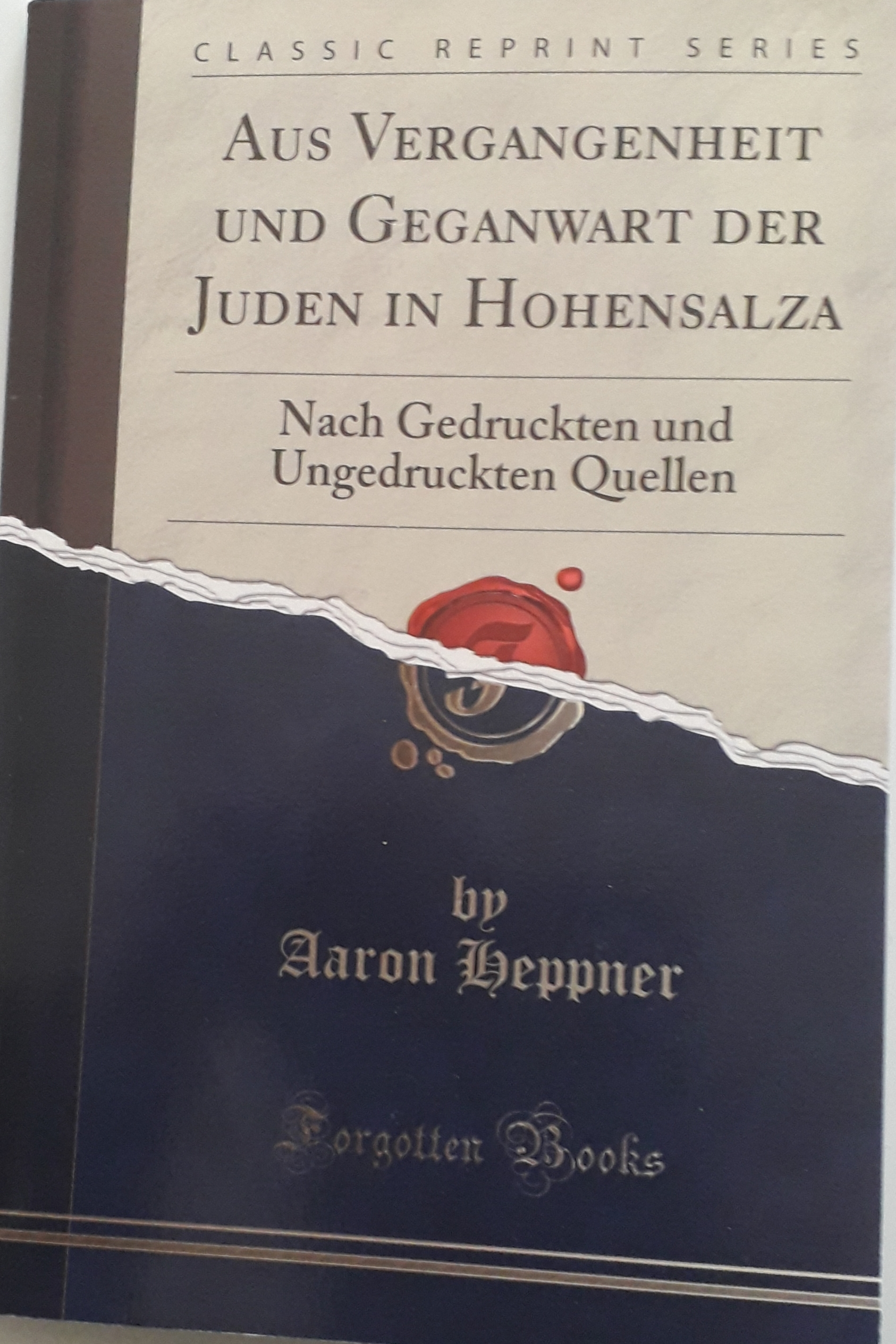 מחקר של הרב ד"ר הפנר ( Heppner, Aron) אשר נדפס בהוצאה מחודשת בשנות האלפיים